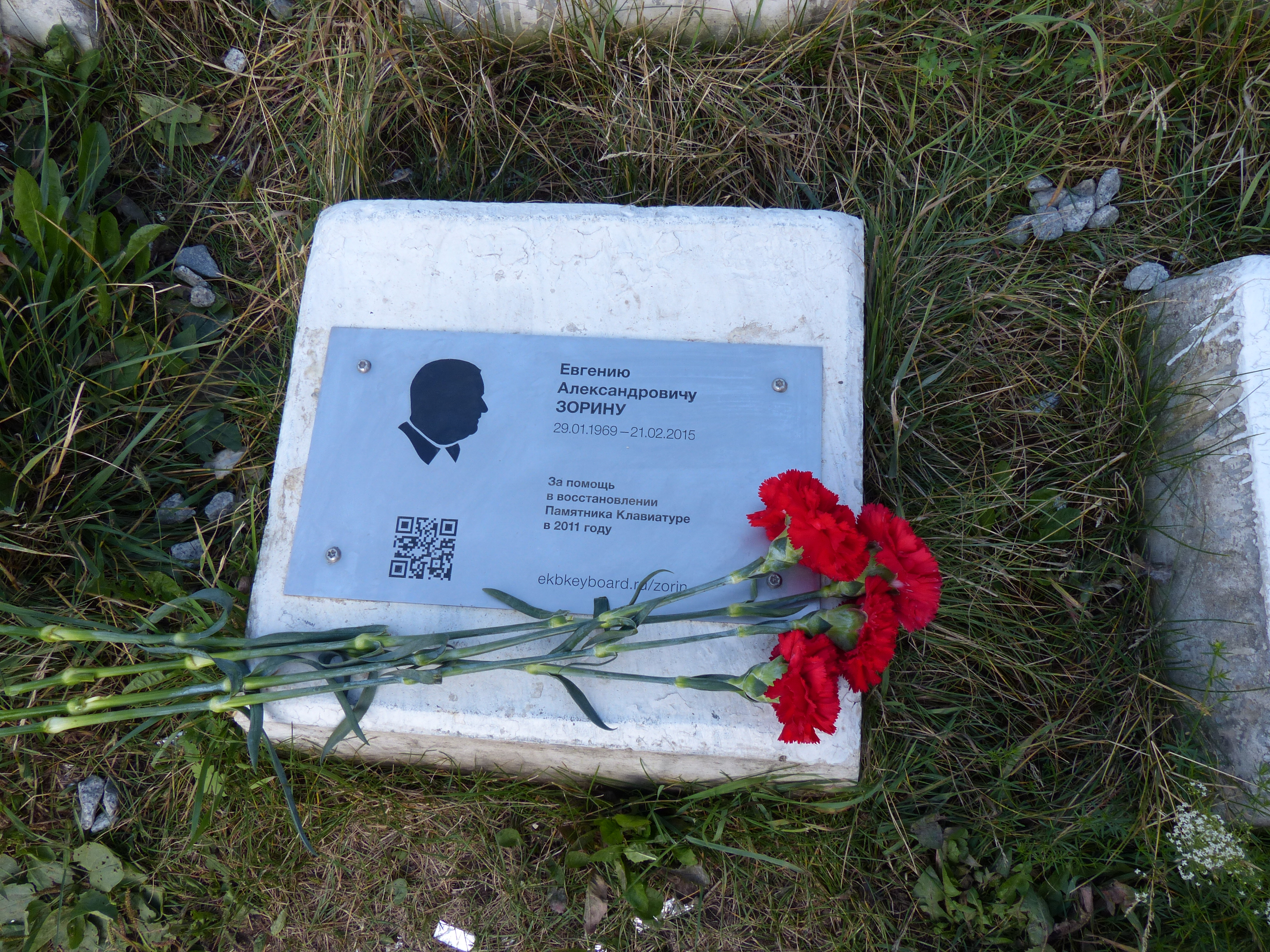 Памятная табличка Жени Зорина на Памятнике клавиатуре